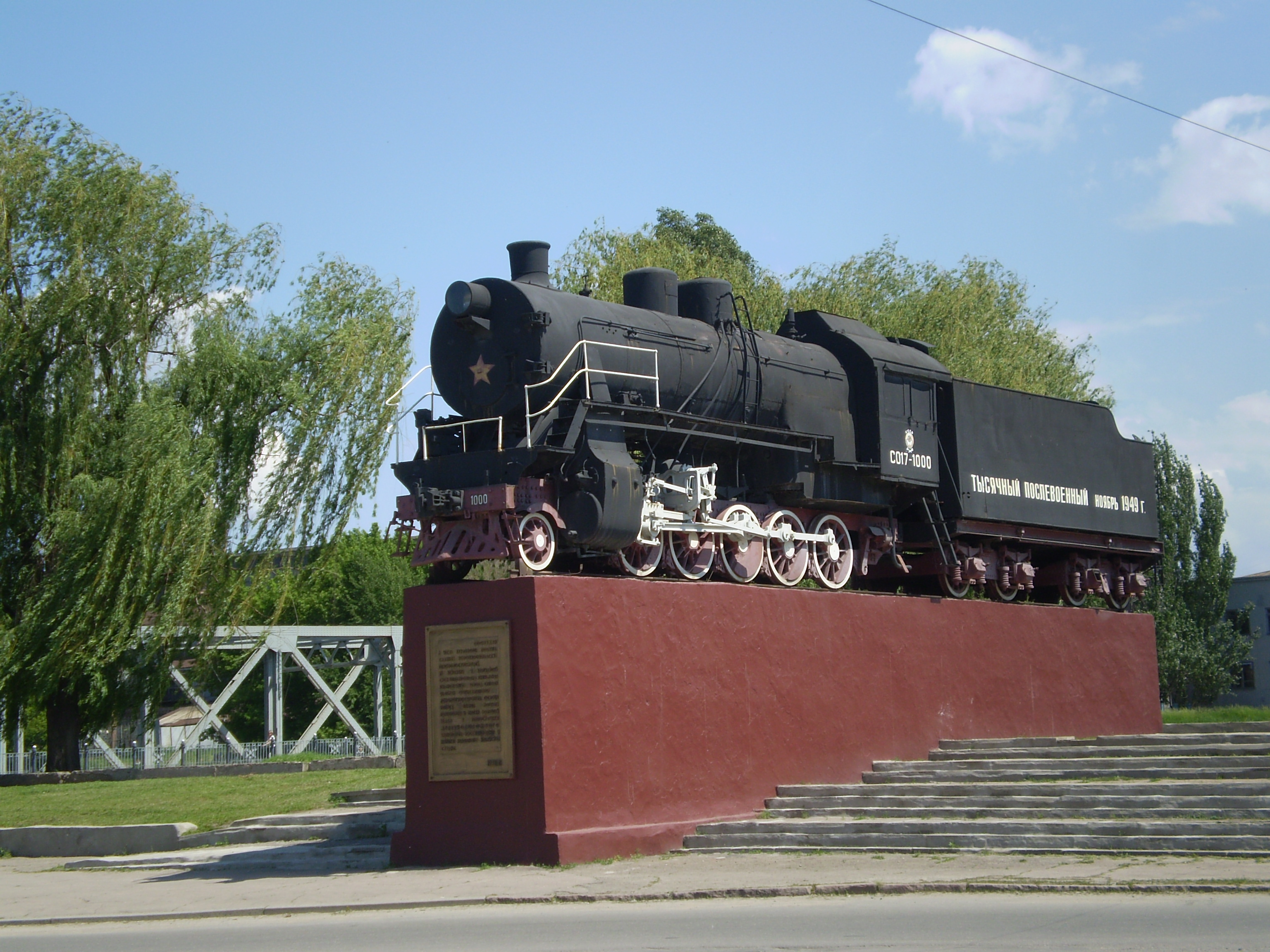 Пам'ятник встановлено неподалік від заводу імені Жовтневої революції в Луганську (тепер "Луганськтепловоз")